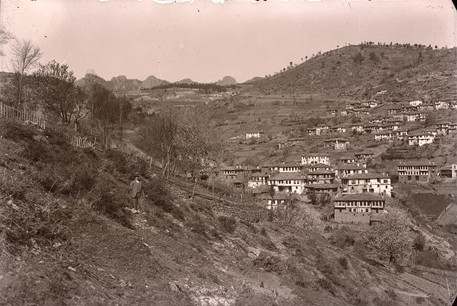 Общ изглед от с. Левочево, Смолянско.